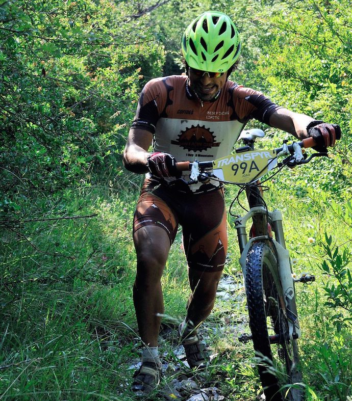 João Marinho TransPyr 2013